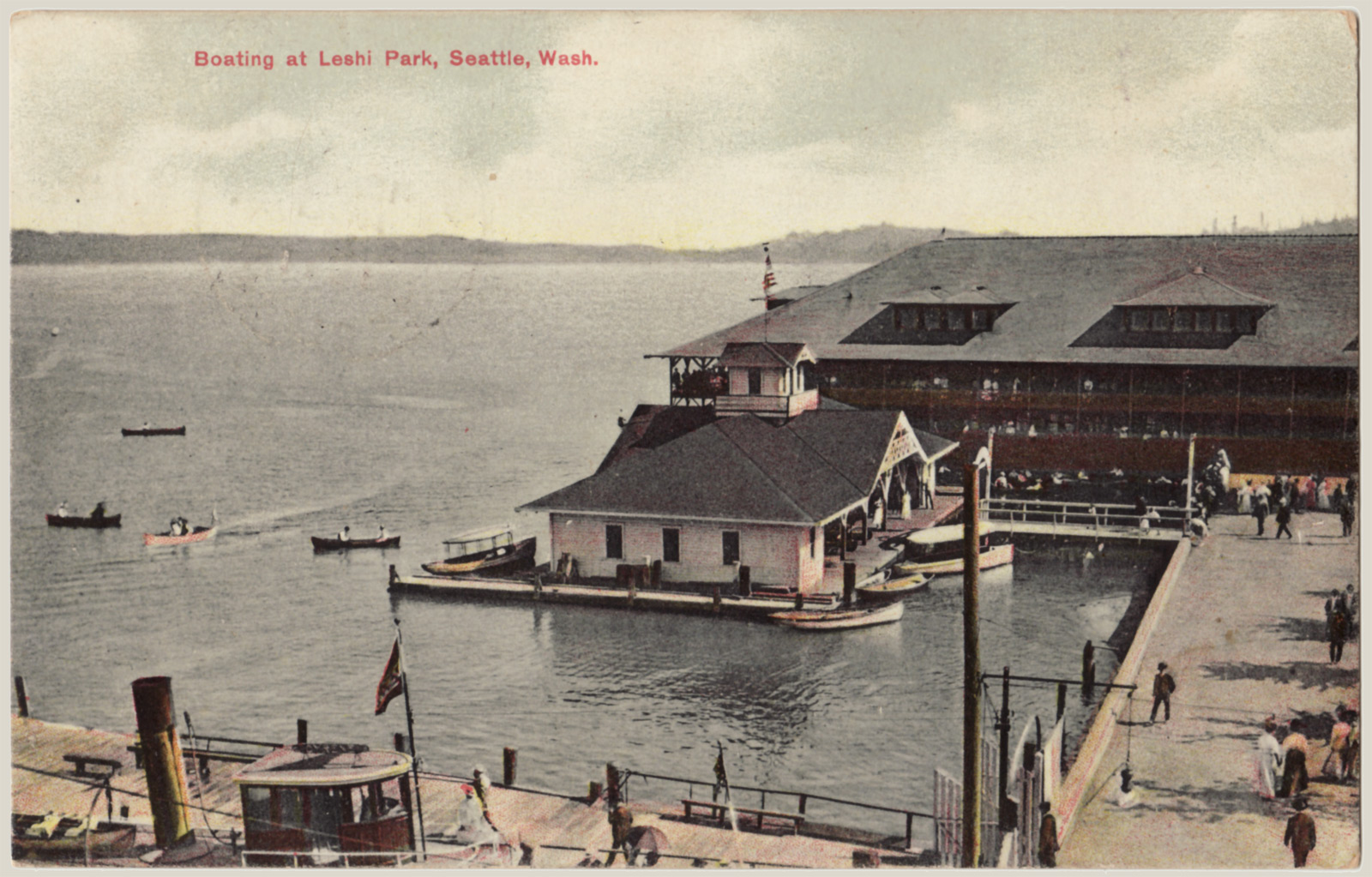 Leschi Park ca. 1911